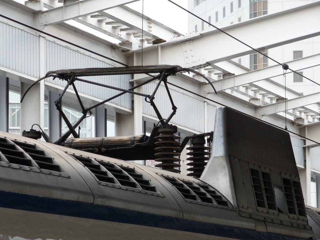 R61編成の下枠交差式パンタグラフPS200とパンタカバー。山陽新幹線、岡山駅。